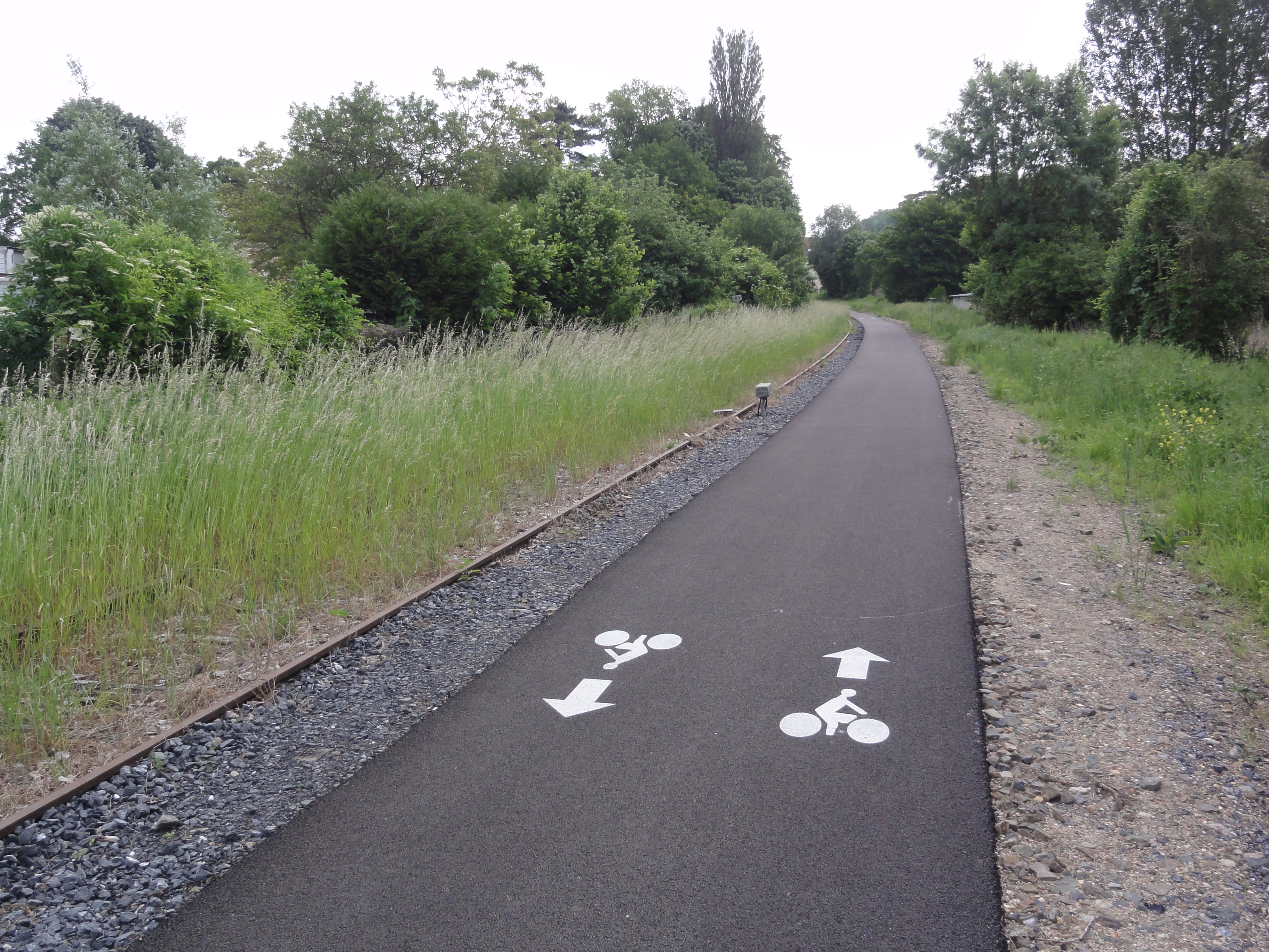 Jaulzy (Oise), piste cyclable Couloisy - Jaulzy - Courtieux